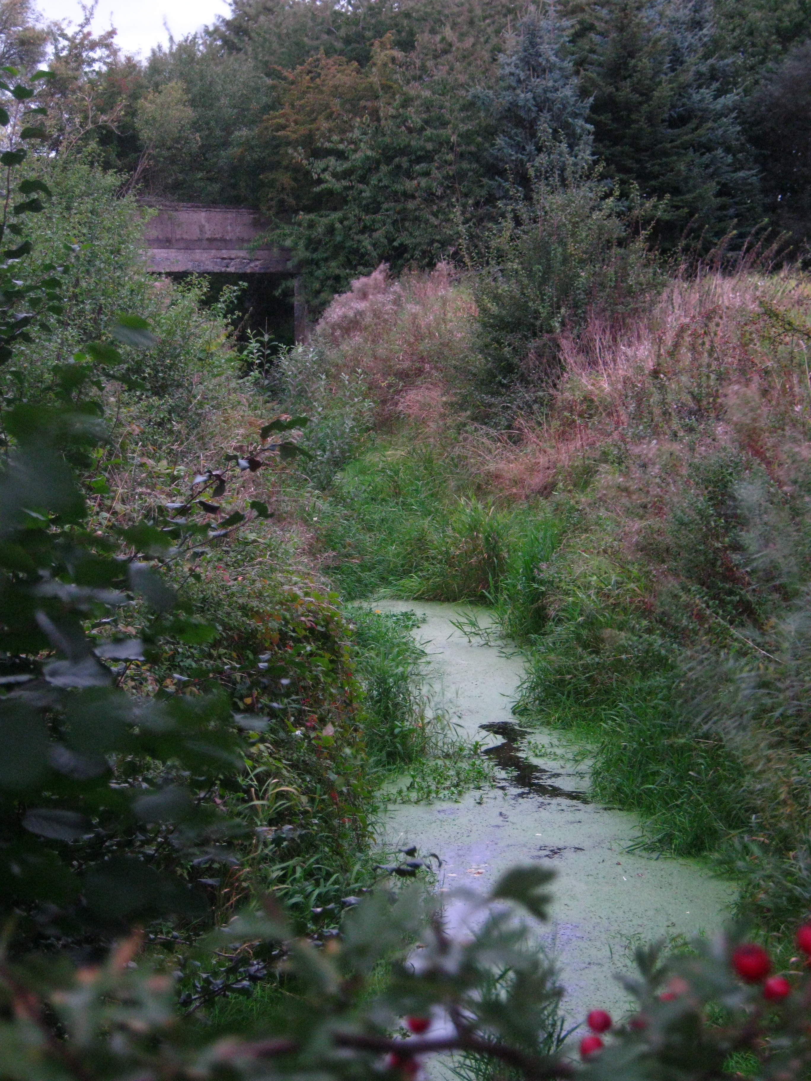 Bißnitz bei Steinbek, zwischen Steinbek und Geschendorf im Kreis Segeberg. Im Hintergrund ist eine alte Brücke der Lübeck-Segeberger Eisenbahn (LSE) zu sehen.